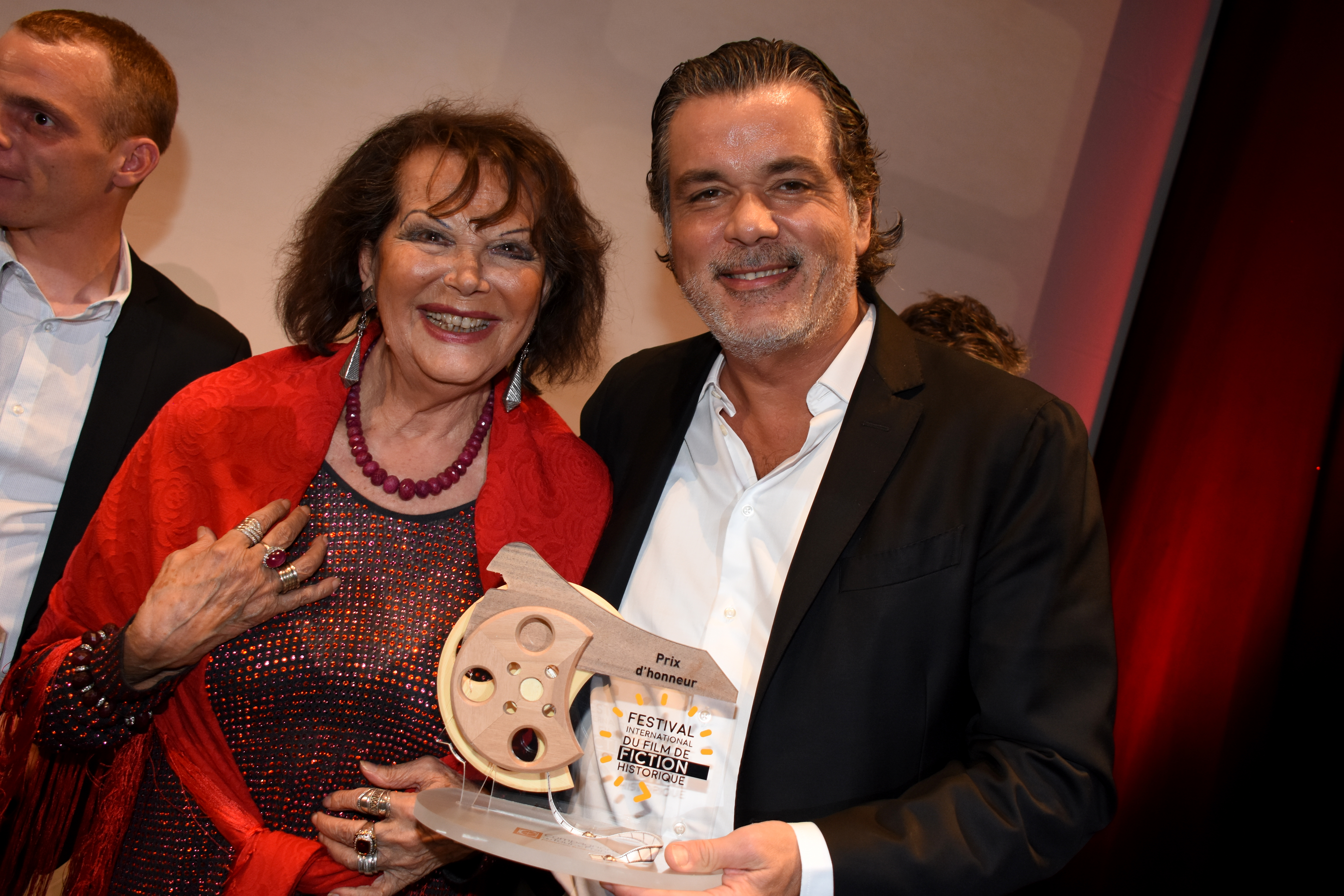 Remise du prix d'honneur à Christophe Barratier